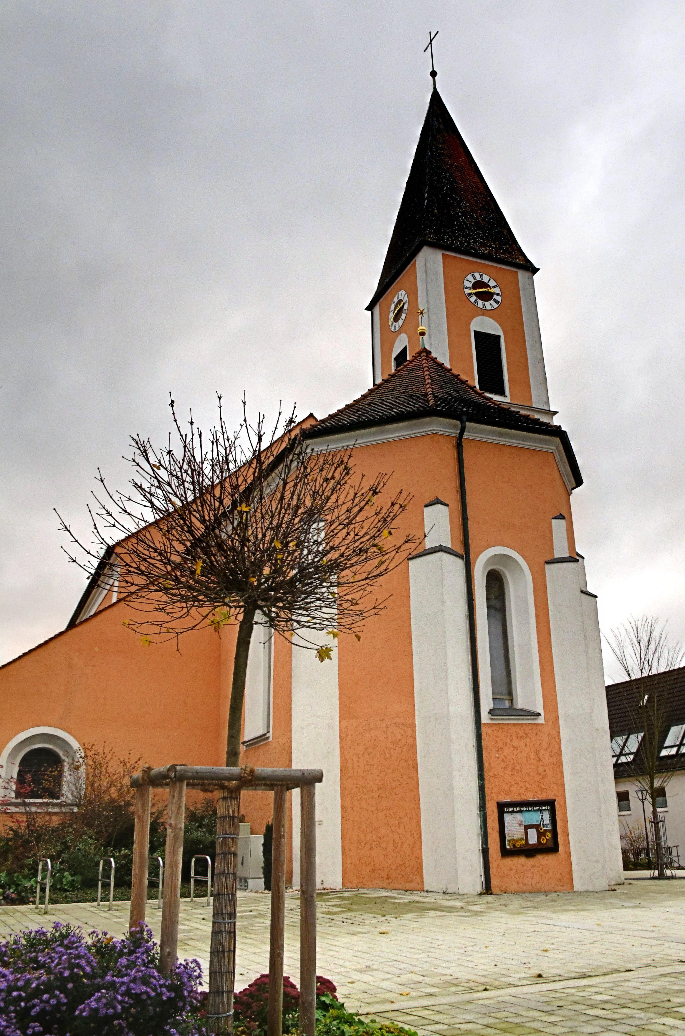 Deutschland, Bayern, Vohenstrauß, Evangelisch-Lutherische Stadtpfarrkirche